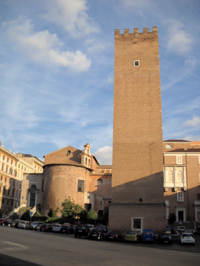 Torre_dei_Capocci e abside della chiesa di San Martino ai Monti.